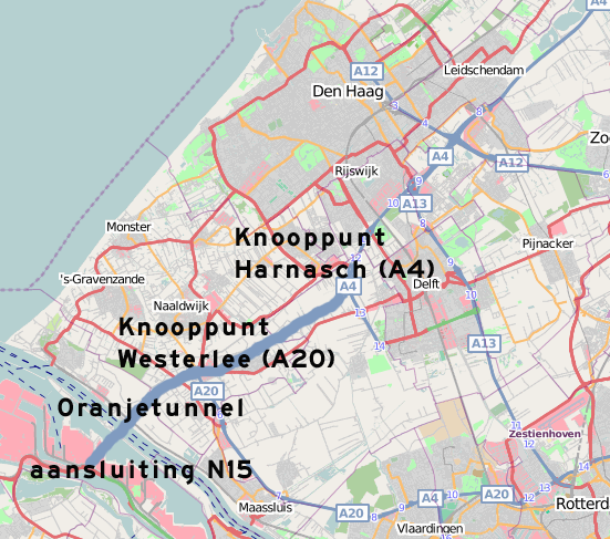 Traject van de geplande A54 (ongeveer)